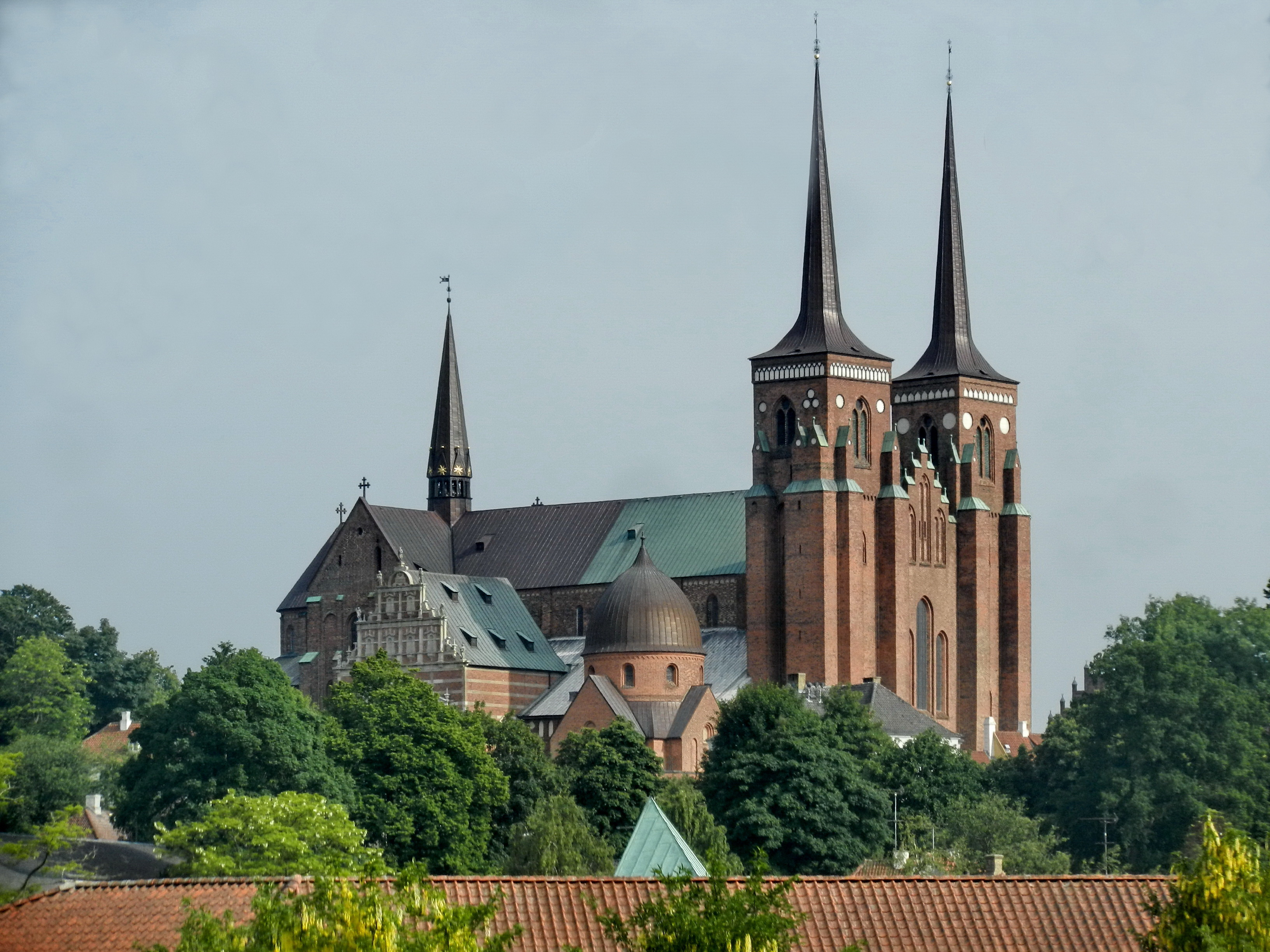 Roskilde Cathedral